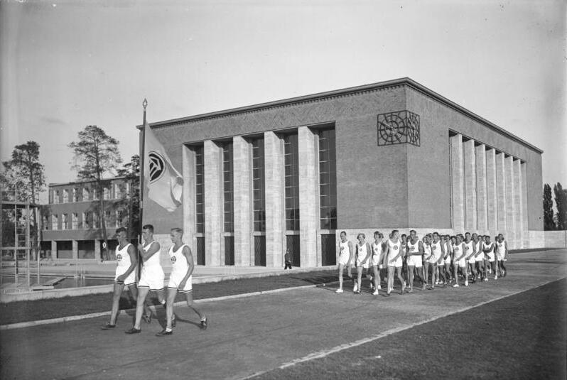 Eine Stätte des Sports! Das Sportforum der Deutschen Hochschule für Leibesübungen in Berlin-Grunewald. Hier werden die Studentinnen und Studenten in allen Arten des Sports ausgebildet.